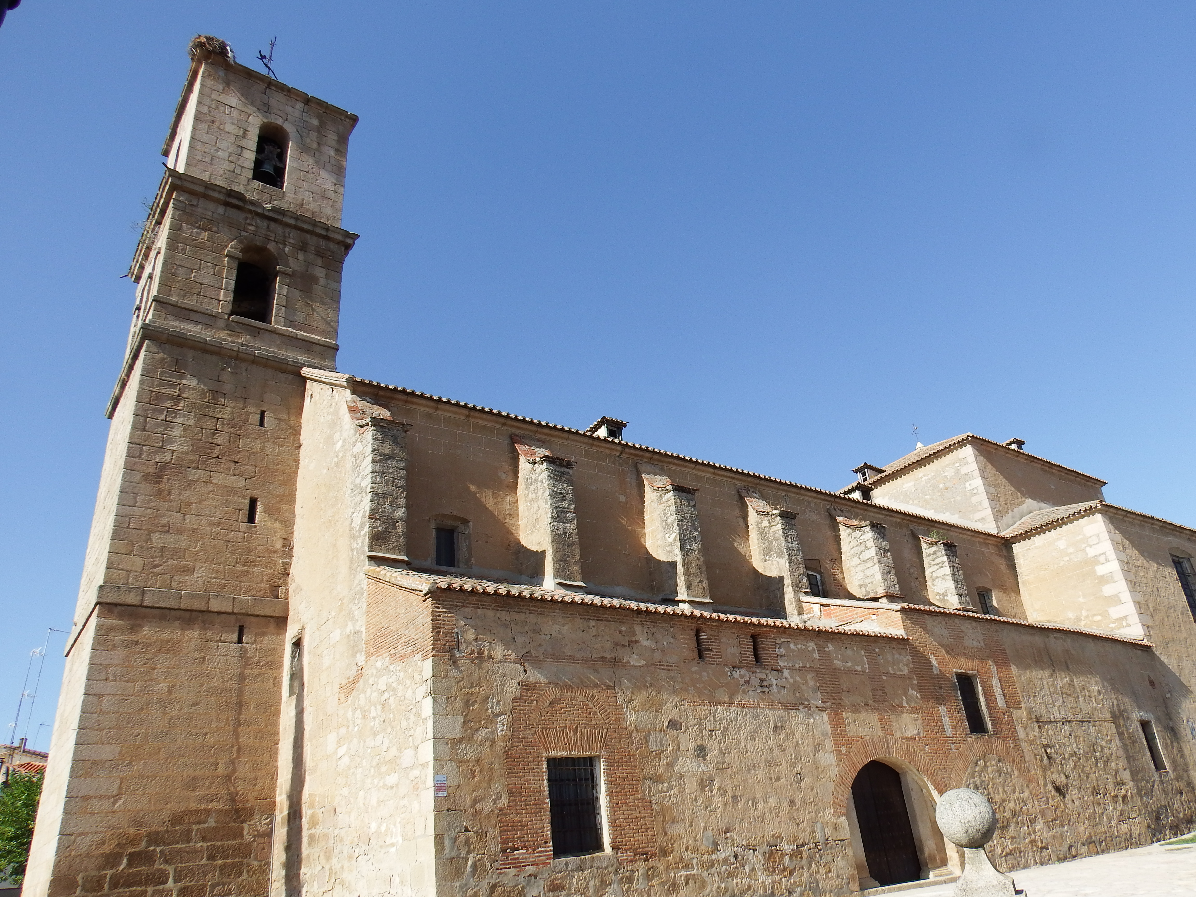 Valdeverdeja